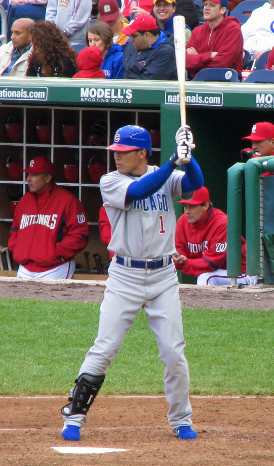 Kosuke Fukudome